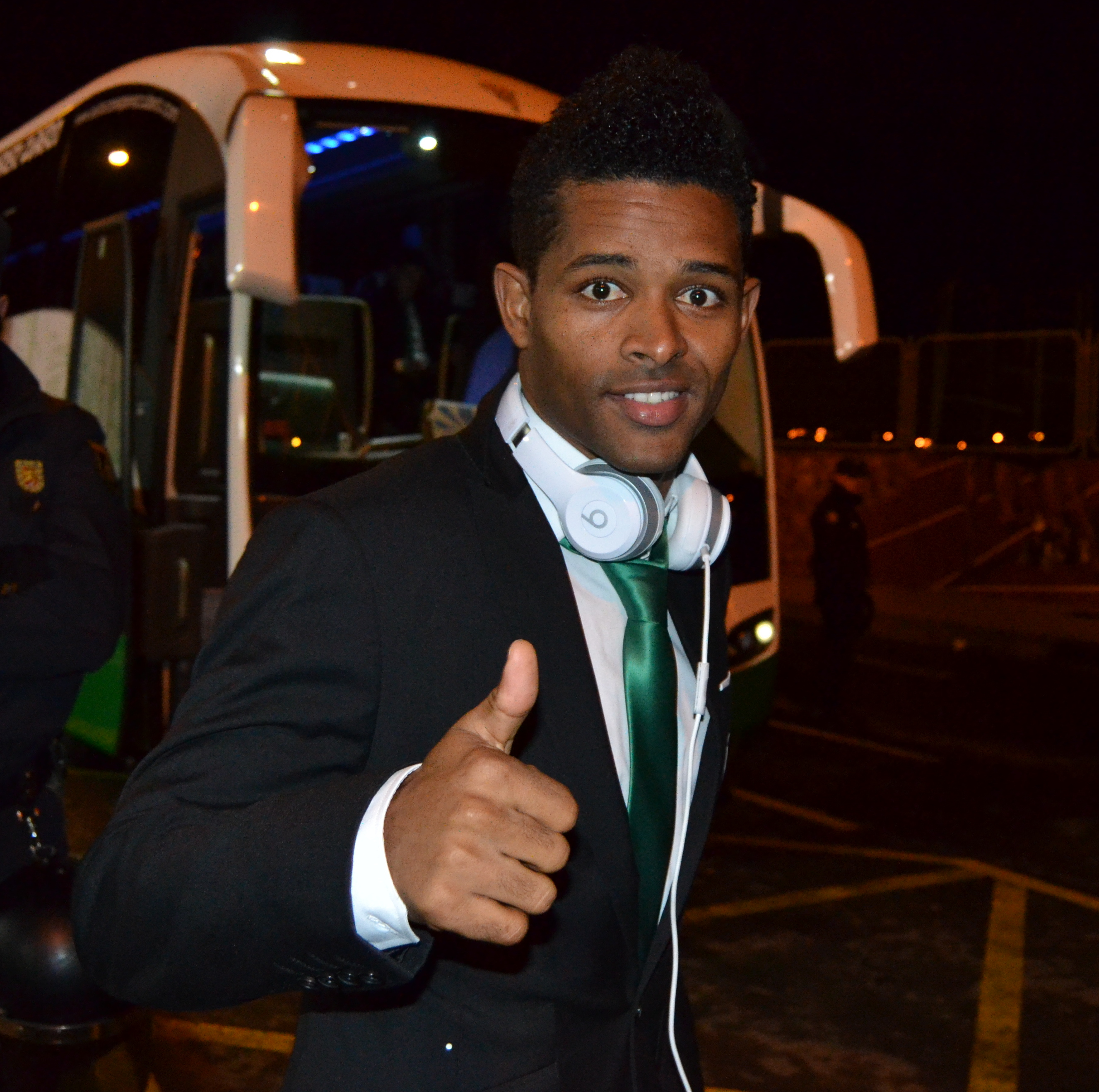 O futbolista Héldon Ramos